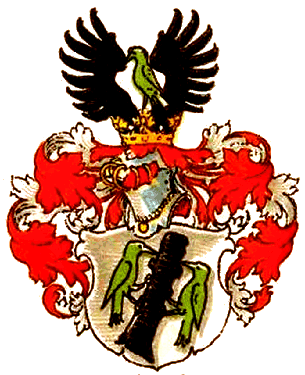 Stammwappen derer von Specht